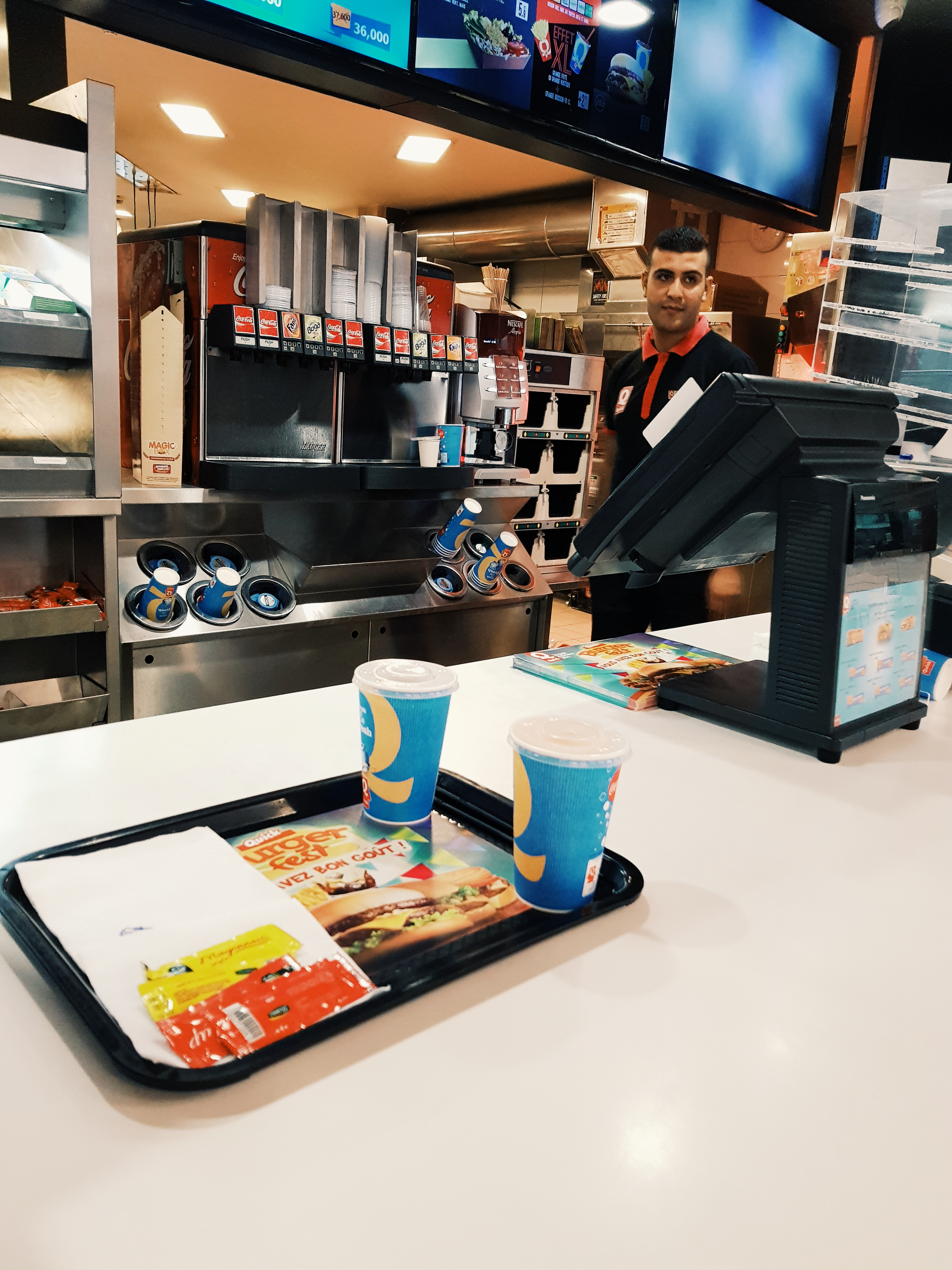 أحد موظفي مطعم Quik This is an image of "African people at work" from Tunisia